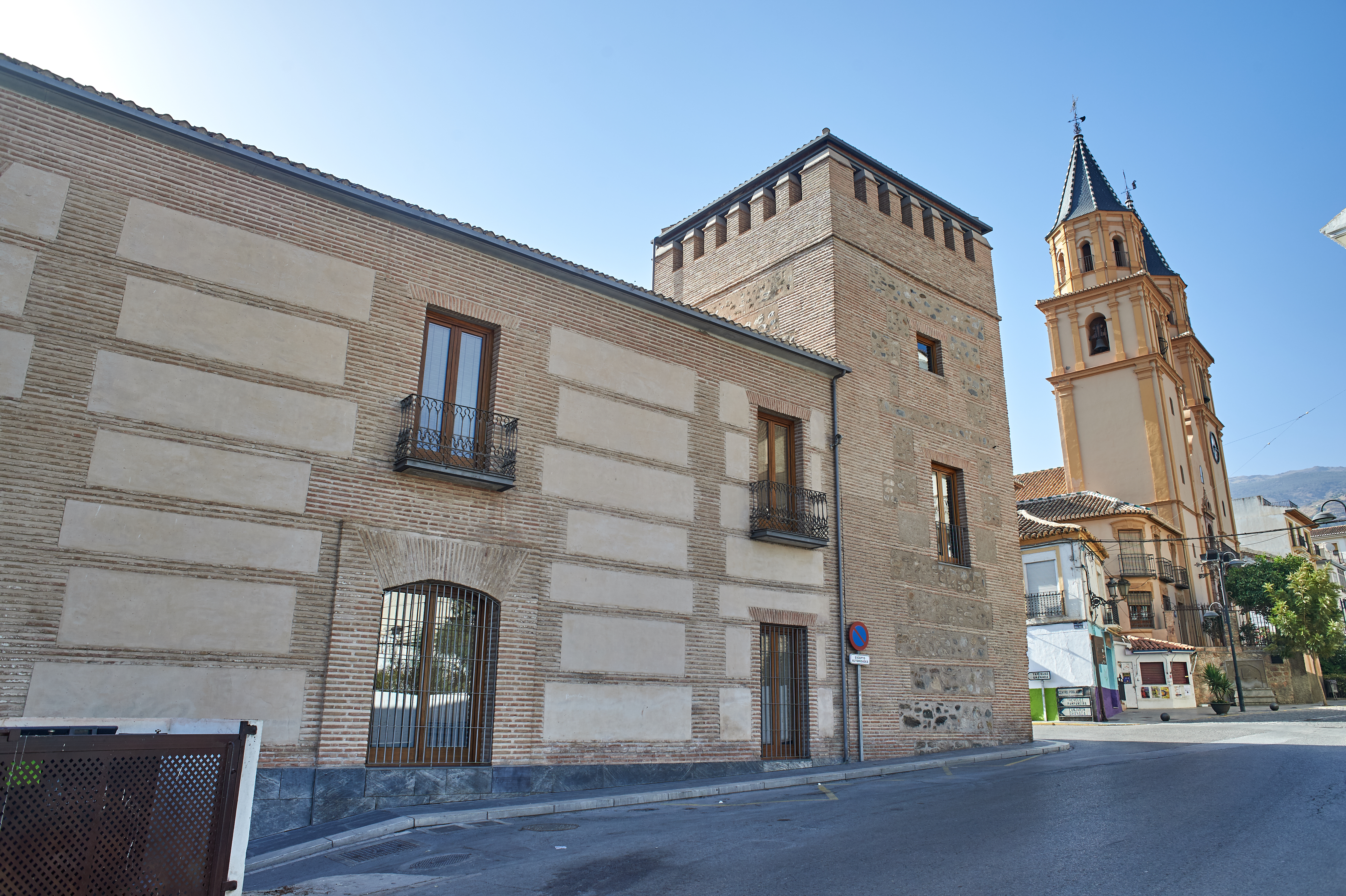 Casa palacio de los Condes de Sastago en Órgiva (Granada)